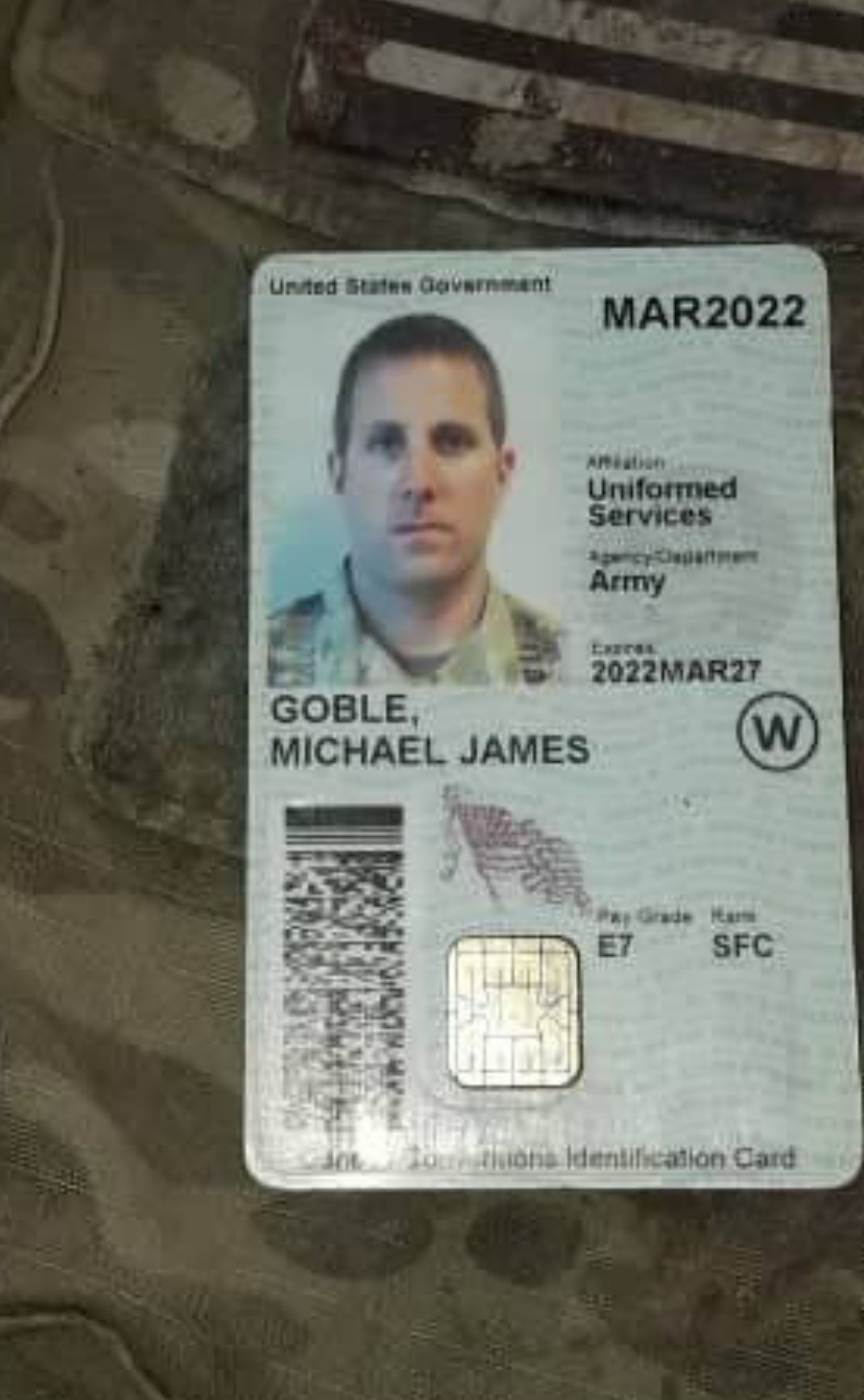 بطاقة الوصول المشترك لجندي أمريكي قُتل في أفغانستان في ديسمبر 2019